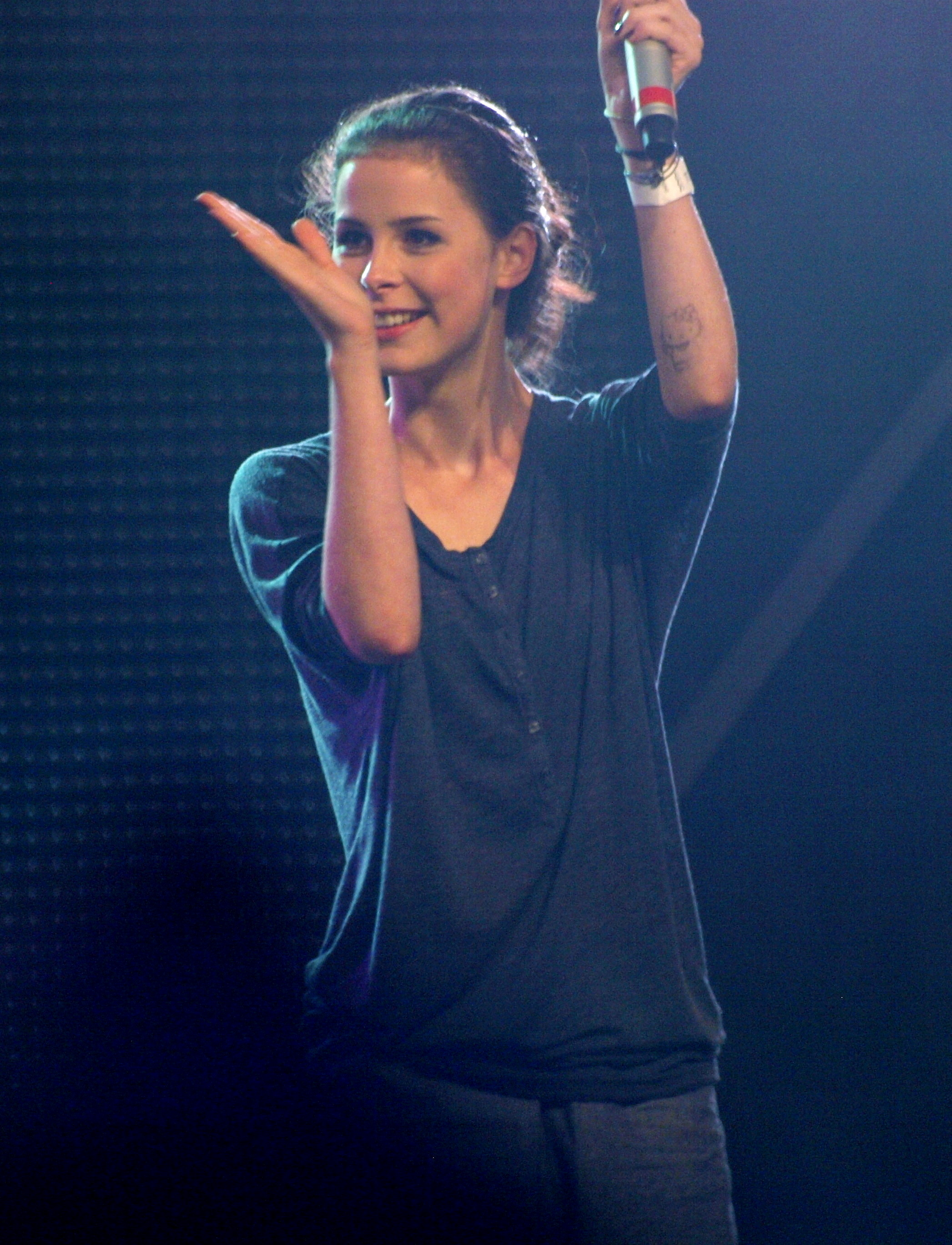 Lena Meyer-Landrut at Stockholm Pride 2010.